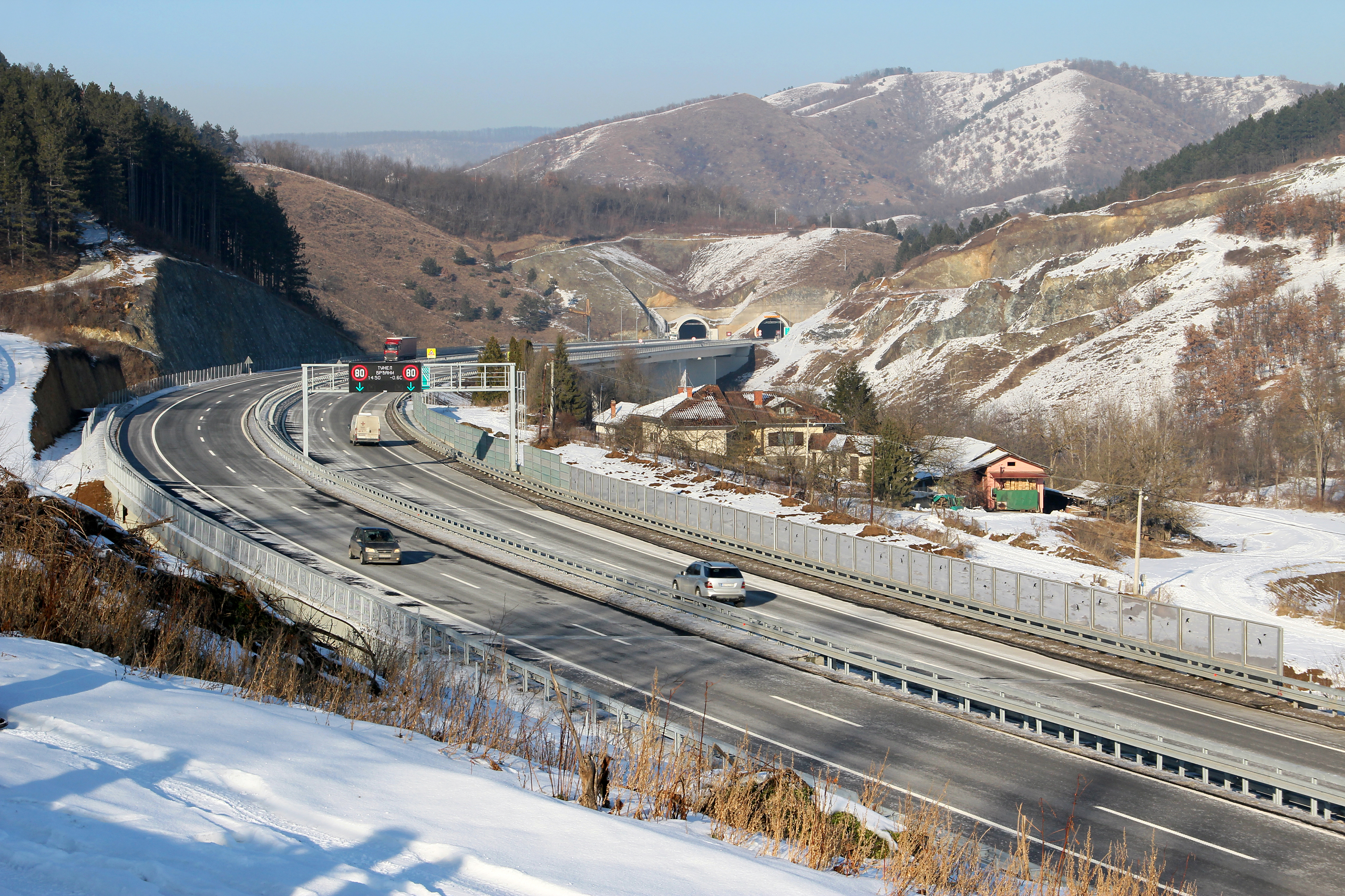 Autoput E763, Brđani